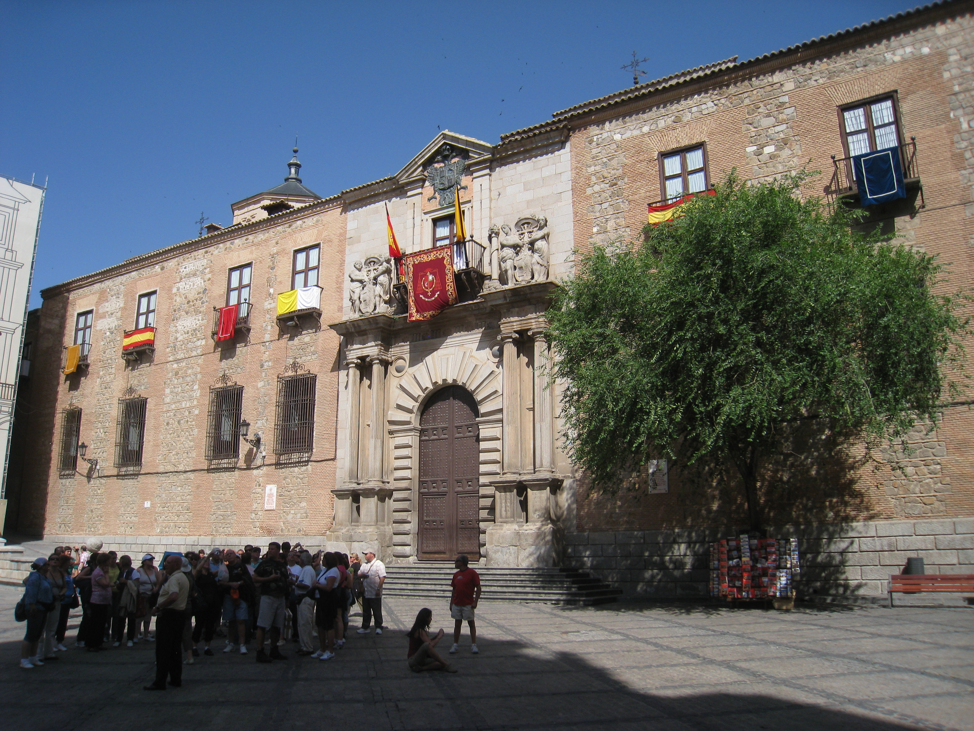 Palacio Arzobispal, Toledo, Spain.